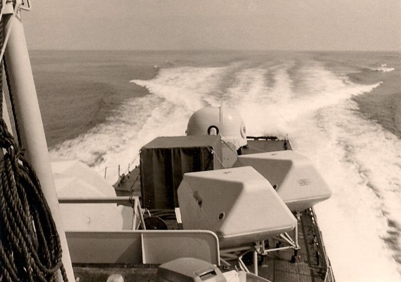 ארגז החסנה נישא על סיפון אח"י רומח